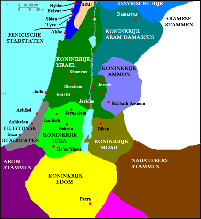 Levant_830.png met vertaling in het Nederlands